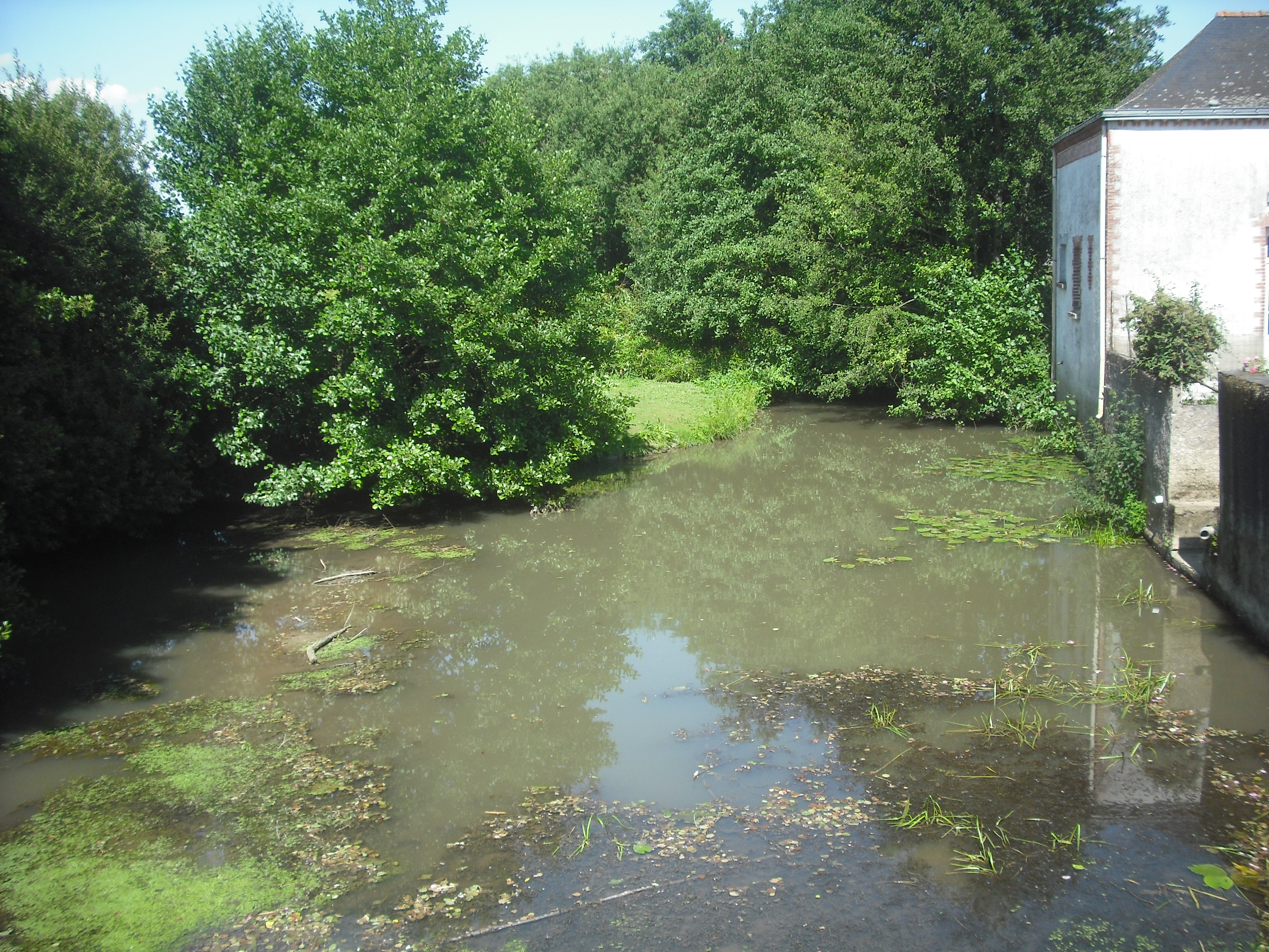 Le Mandit à Candé, Maine-et-Loire, France.